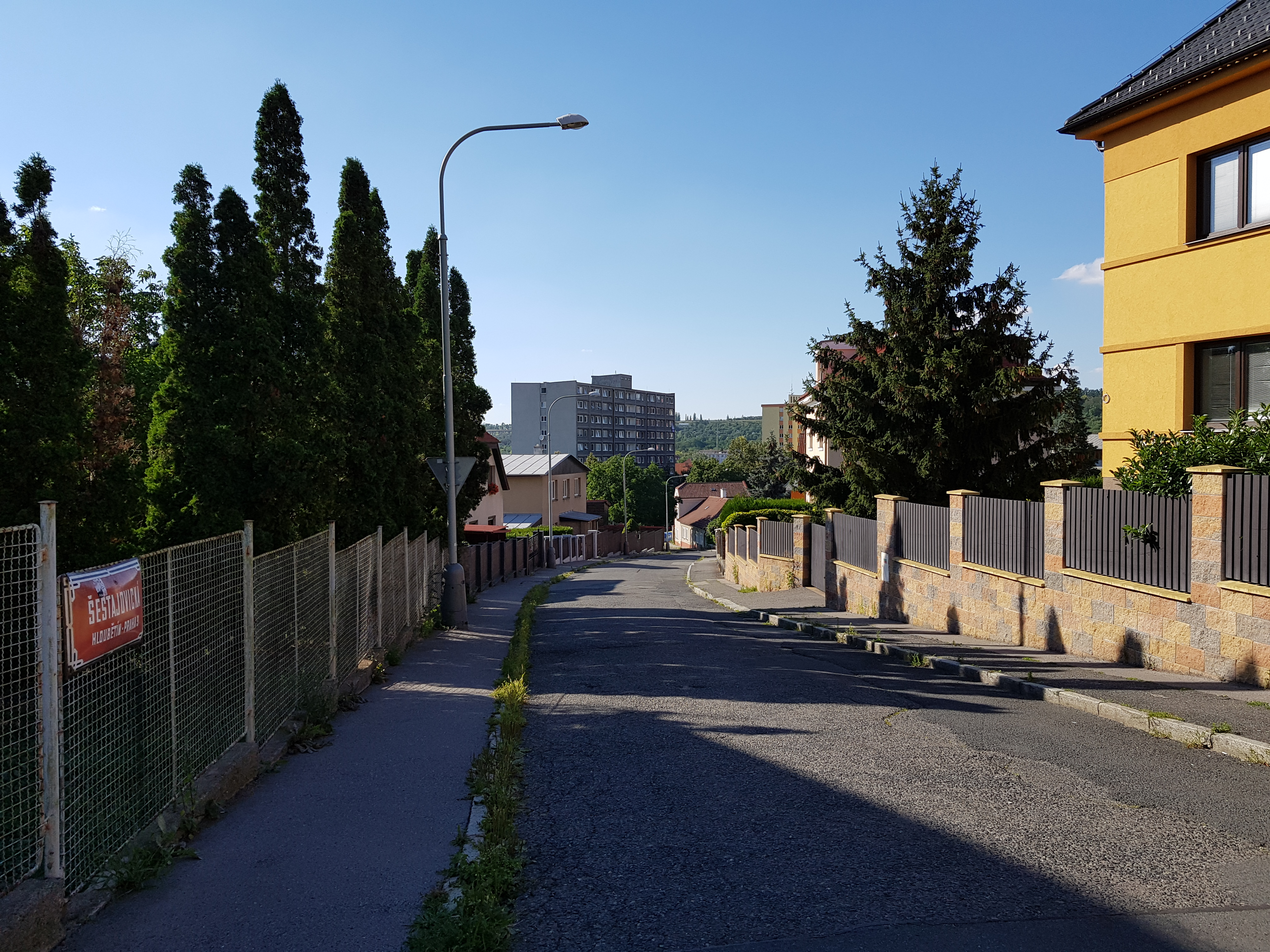 Šestajovická ulice, Praha 14-Hloubětín, pohled od ulice V Chaloupkách na sever